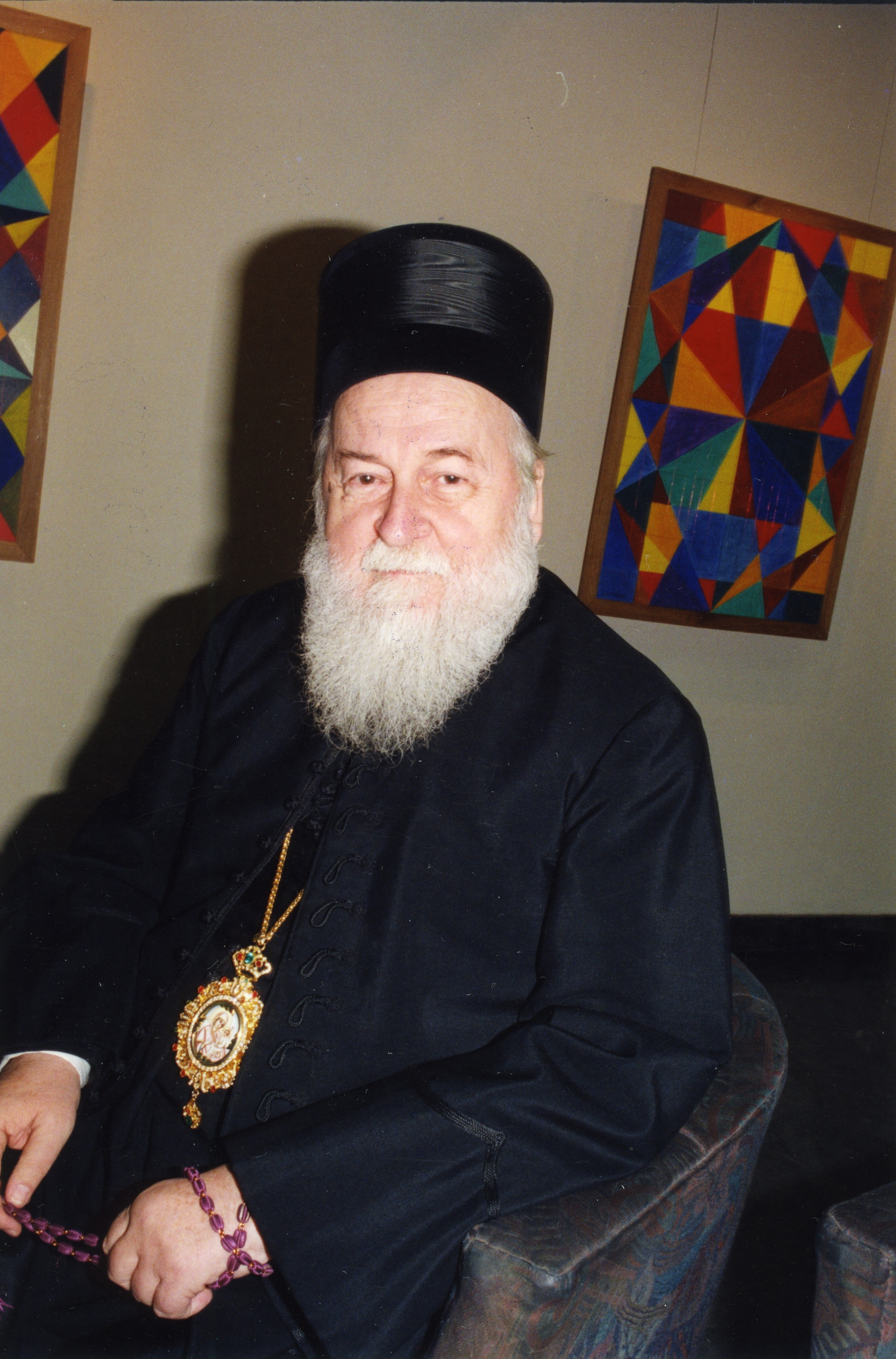 Episkop šumadijski Sava 1996.